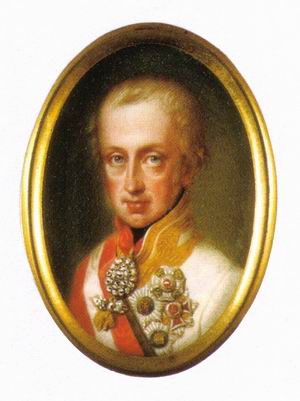 Ferdinand I., Kaiser von Österreich (1793-1875)